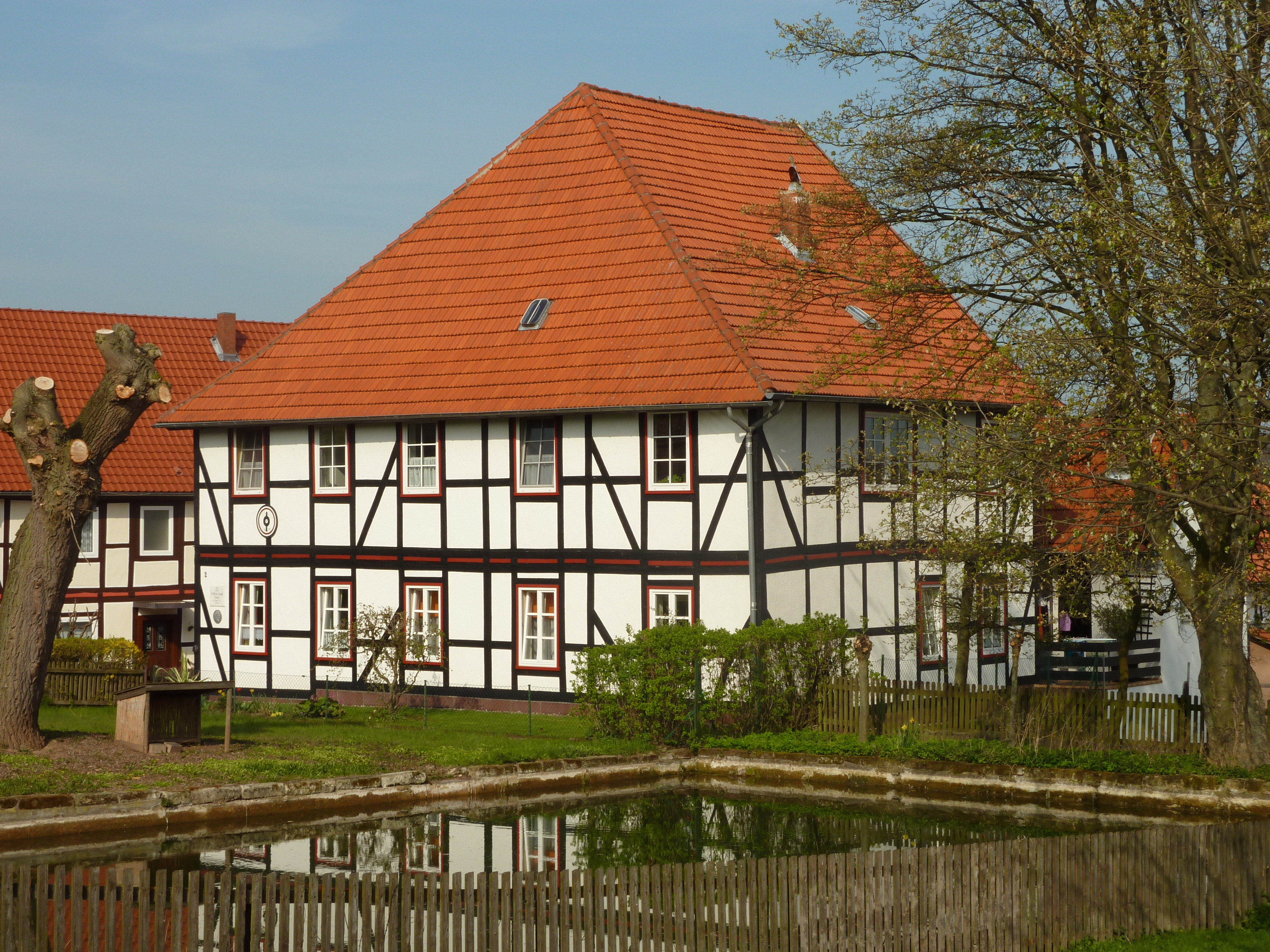 Fachwerkhaus Am Teich 2 in Gelliehausen, Gemeinde Gleichen, Südniedersachsen. Im Kern 2. Hälfte 18. Jahrhundert. Gedenktafel: "Hier dichtete Gottfried August Bürger im Jahre 1773 Lenore"